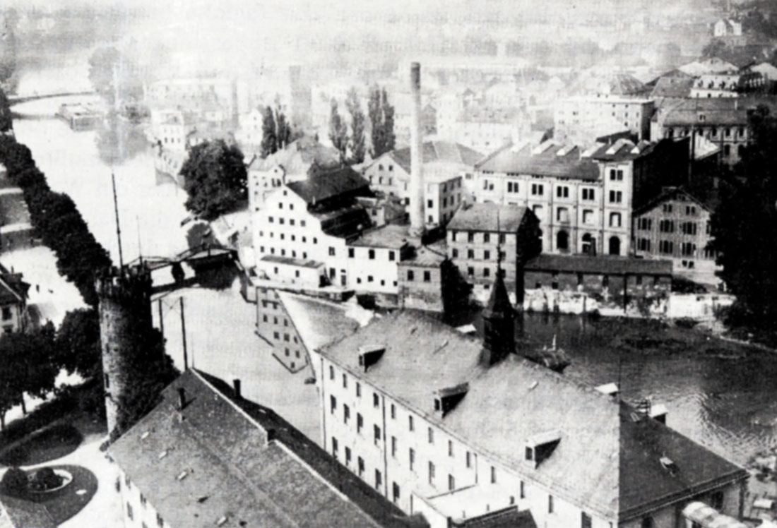 Die Papierfabriken Rauch und Schaeuffelen am Neckar in Heilbronn